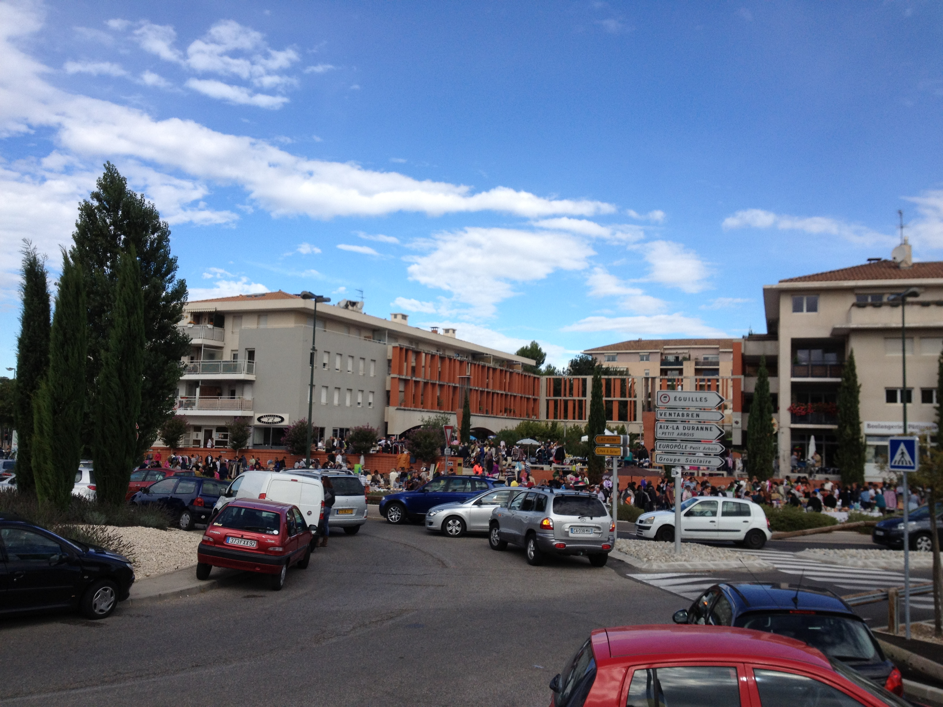 La place centrale de la Duranne Grand Vallat, en septembre 2012 lors du traditionnel vide-grenier